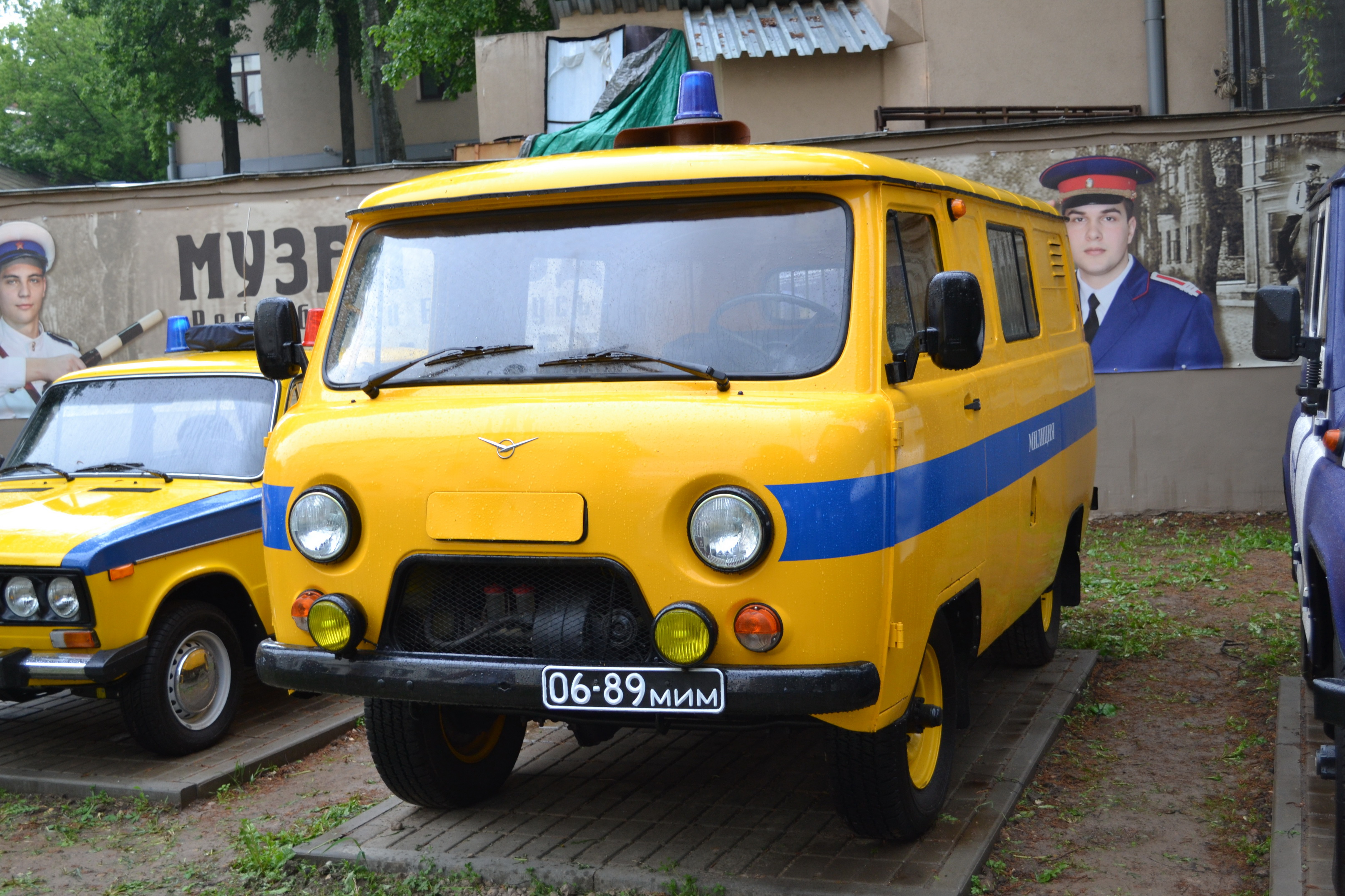 Беларуская (тарашкевіца): Вікісустрэча ў Менску 17 траўня 2014